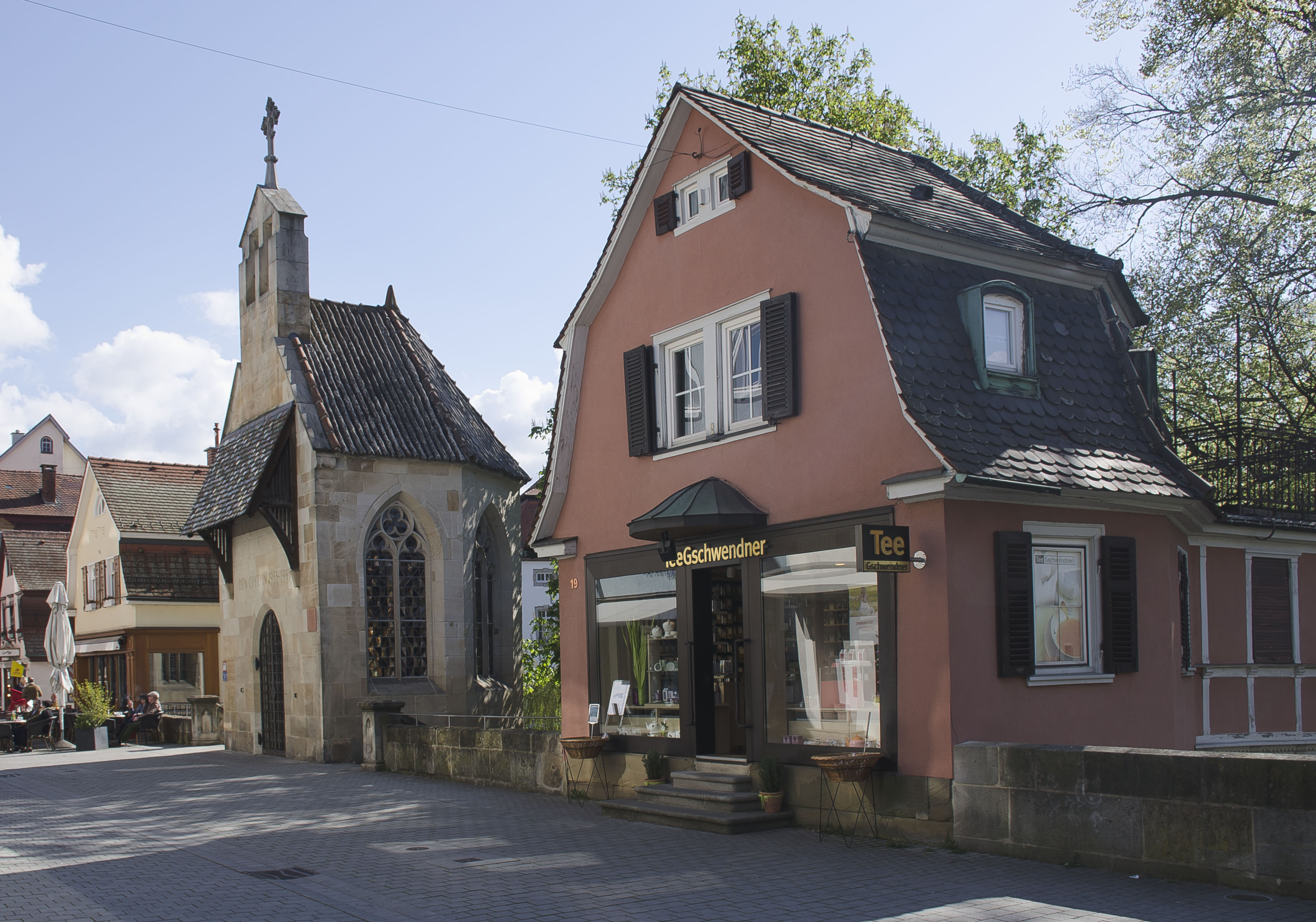 Esslingen am Neckar, Innere Brücke